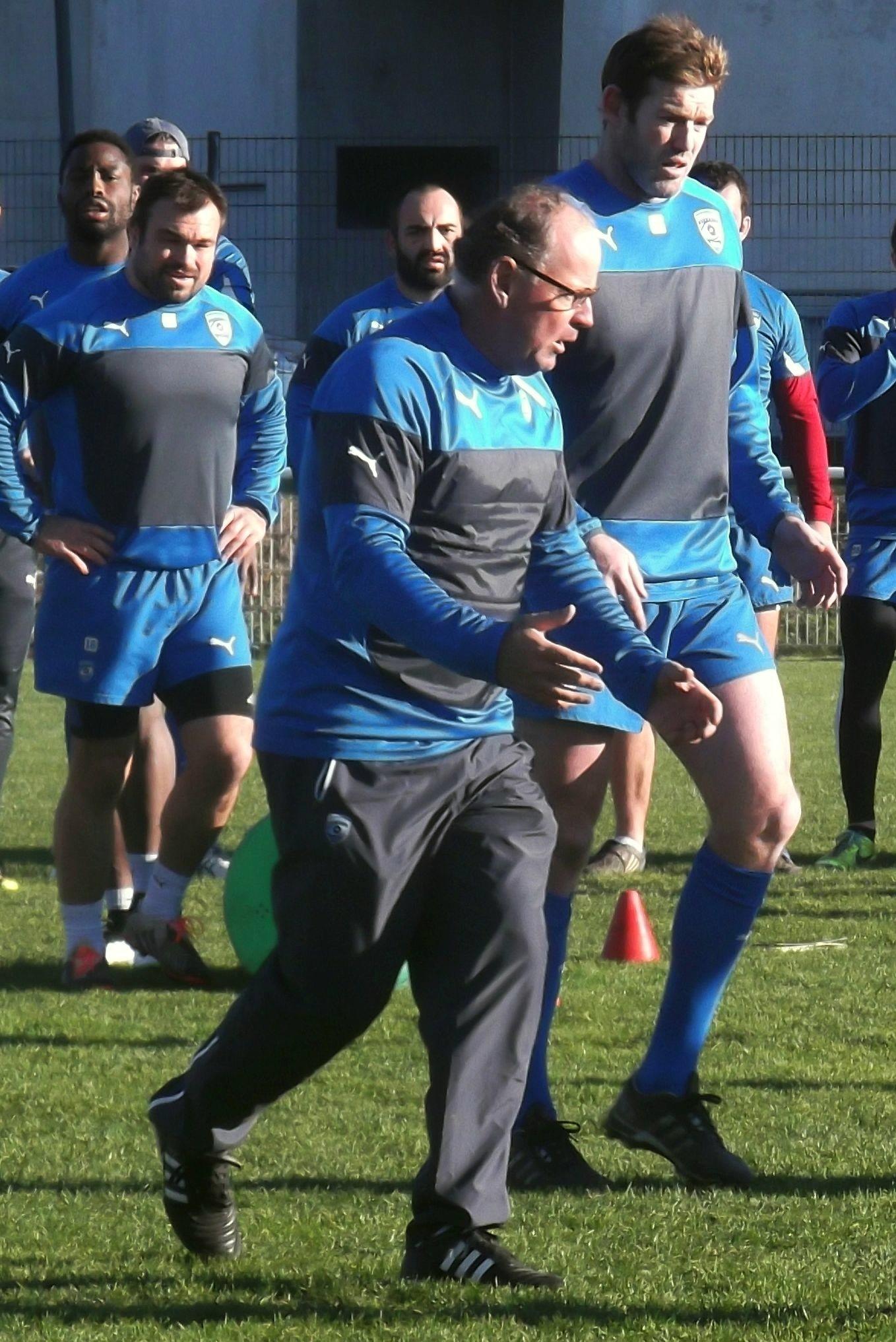 Jake White, Montpellier, 31 décembre 2014.